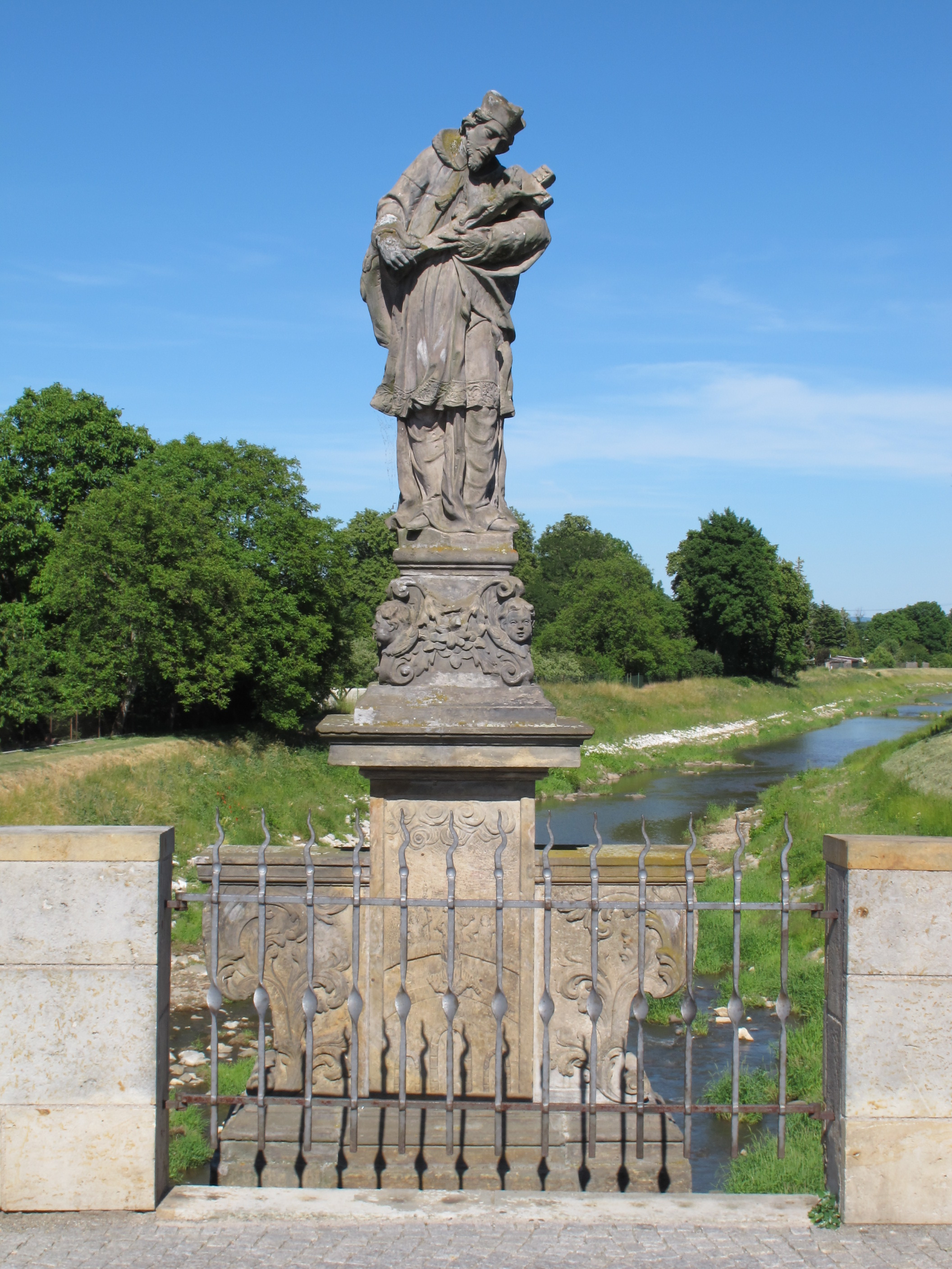 Svatojánský most, Vítězná, Litovel. This file was uploaded during the project of WikiTown Litovel.